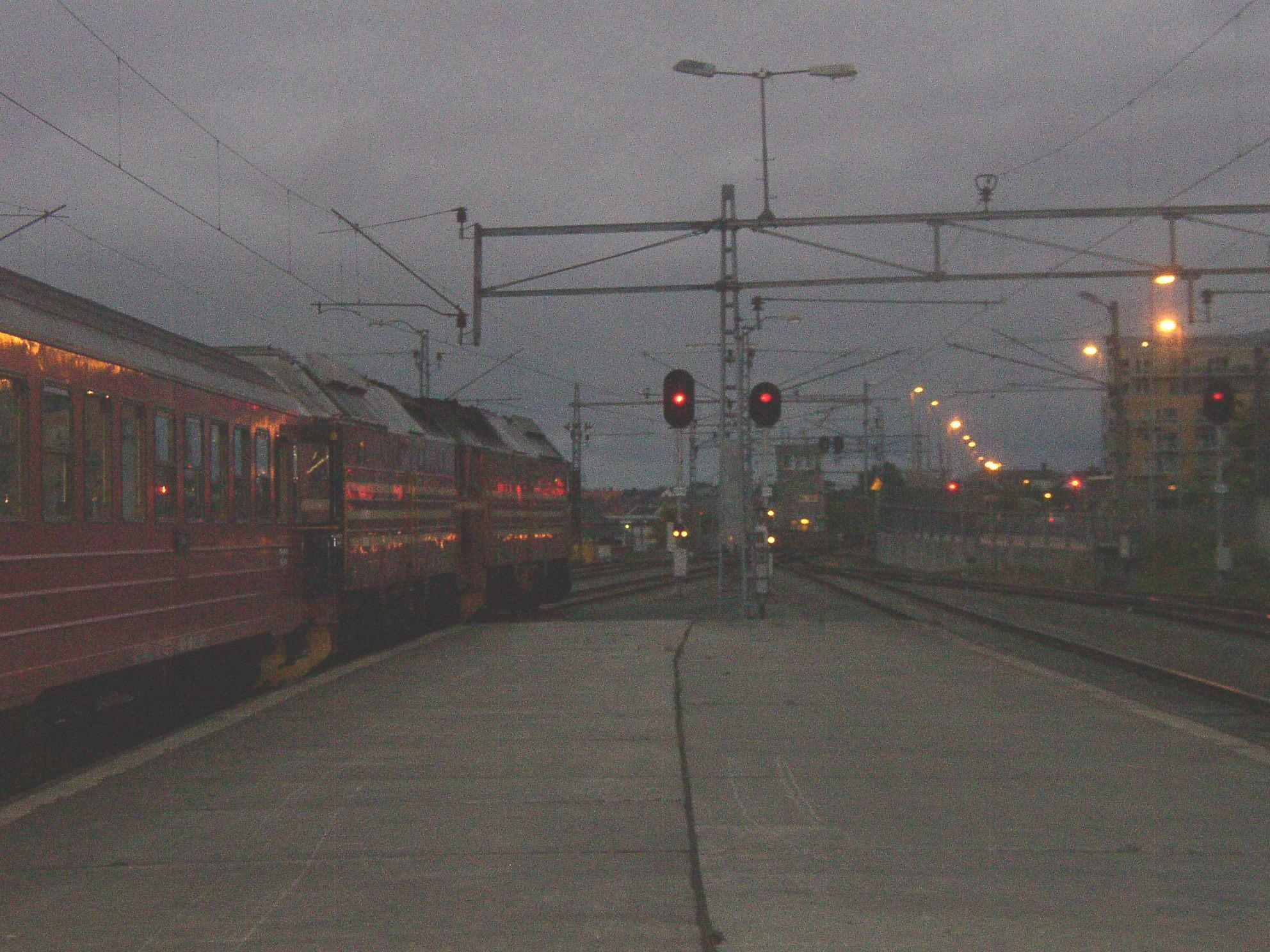 Locomotives Di 4 stationnant en gare de Trondheim en tête du train de nuit N°475 à destination de Bodø, le 18/07/06. Photo personnelle. Catégorie:Trondheim